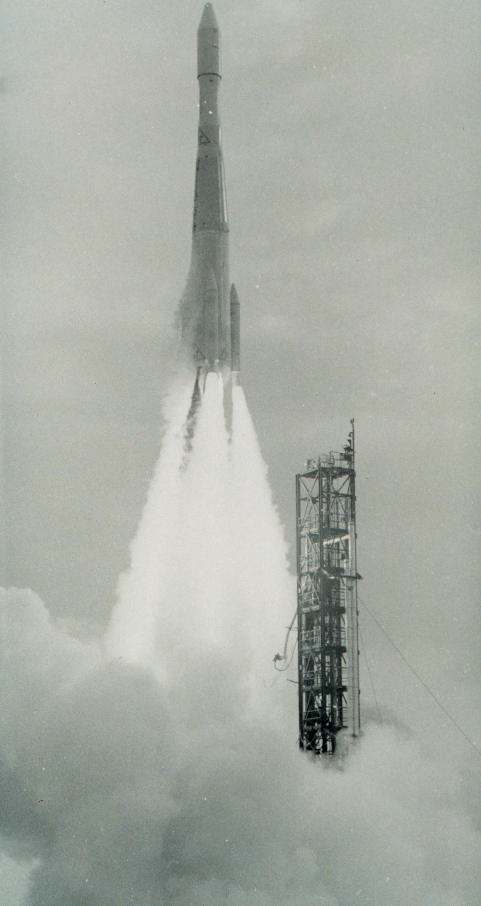 Delta 37 rocket propelling ESSA II into orbit.